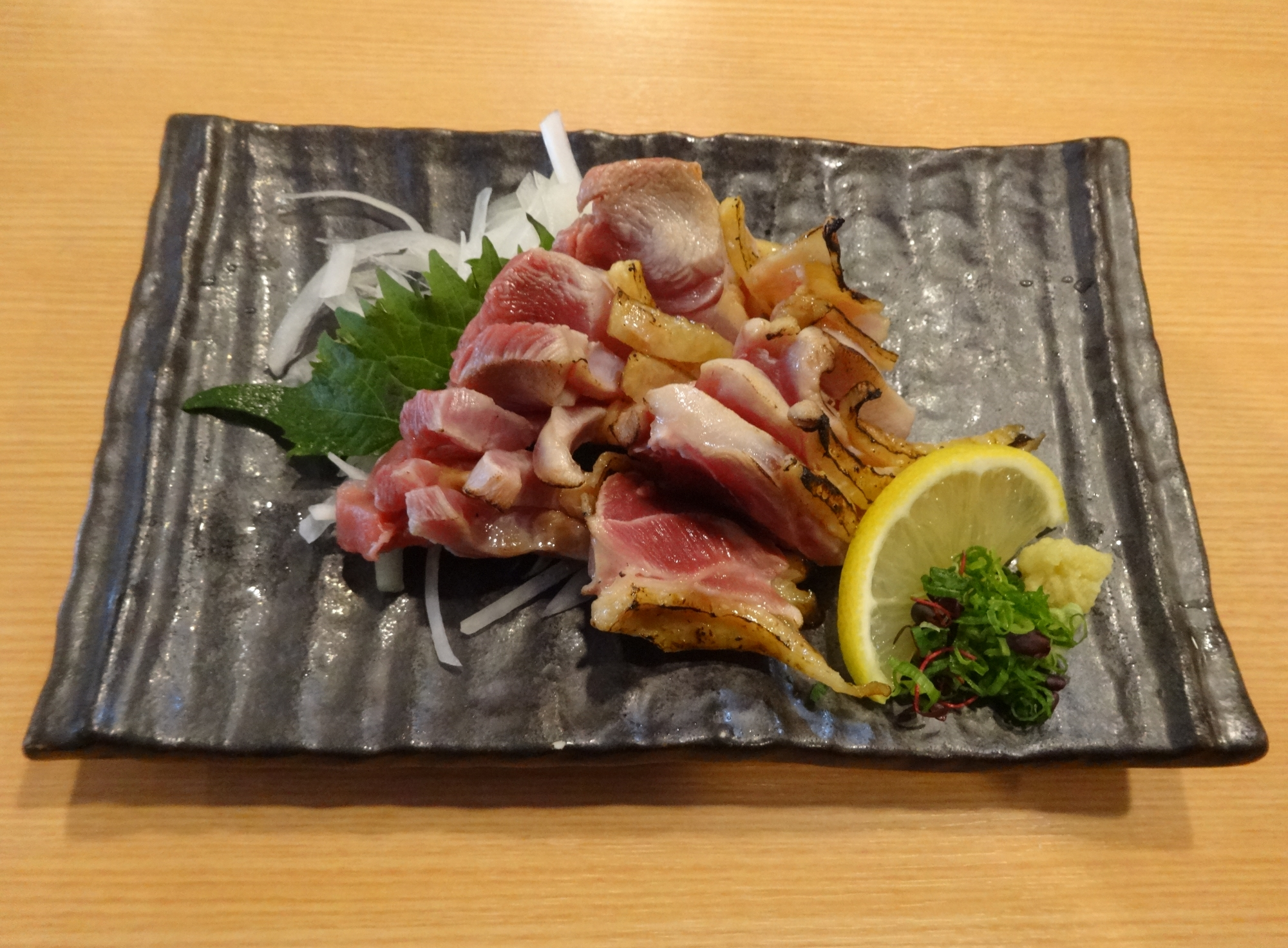 地鶏の刺身（鹿児島県鹿児島市、吾愛人中央駅東口店より撮影）